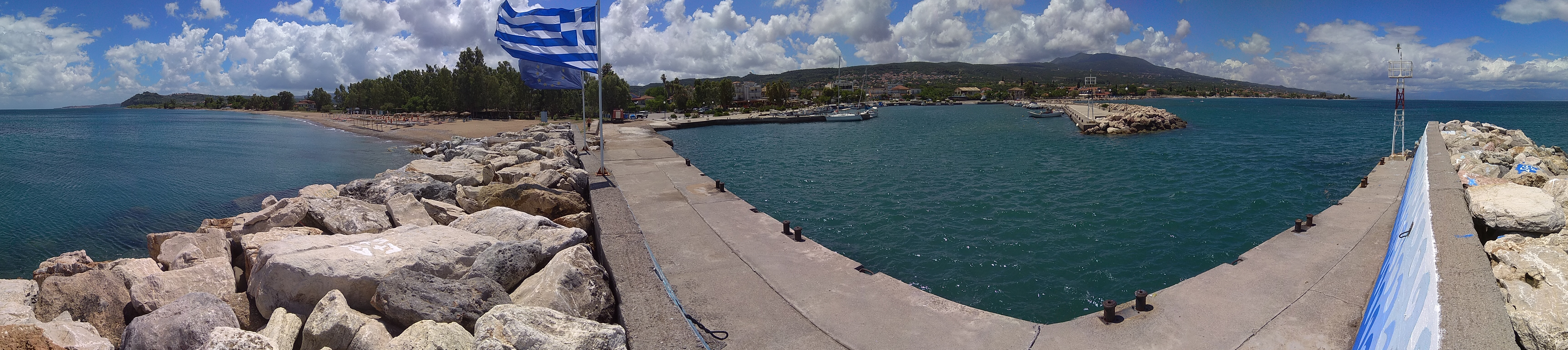 Panoramic